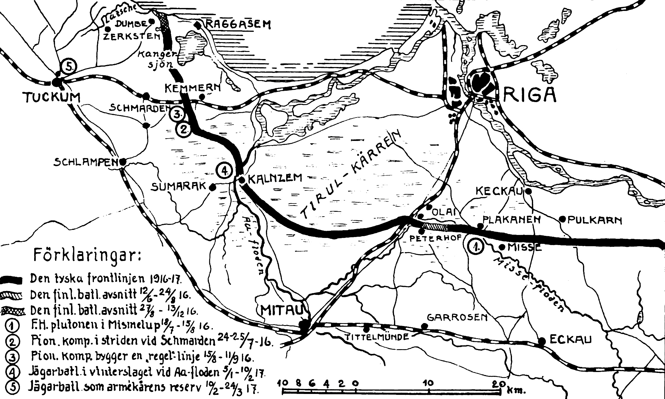 Einsatzabschnitte des Königlich-Preußischen Jäger-Bataillons Nr. 27 in den Jahren 1916 und 1917.